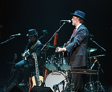 Francesco De Gregori